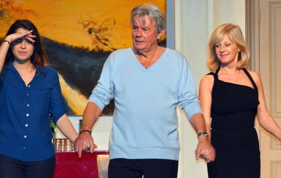 Anouchka Delon, Alain Delon, Elisa Servier et Julien Dereins à la fin d'une représentation de la pièce "Une journée ordinaire", au théâtre du casino d'Enghien-les-Bains.